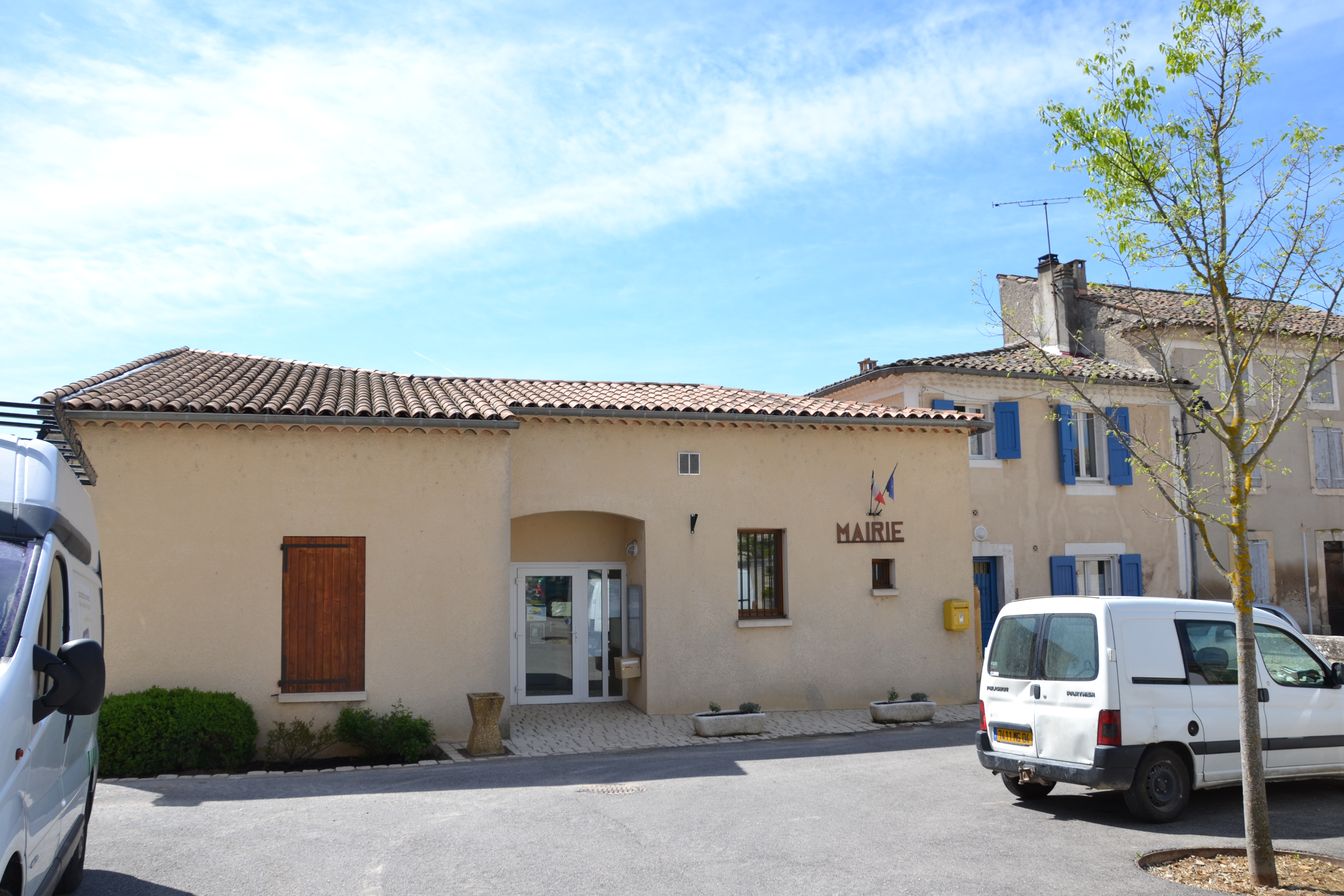 Mairie de Niozelles (04)